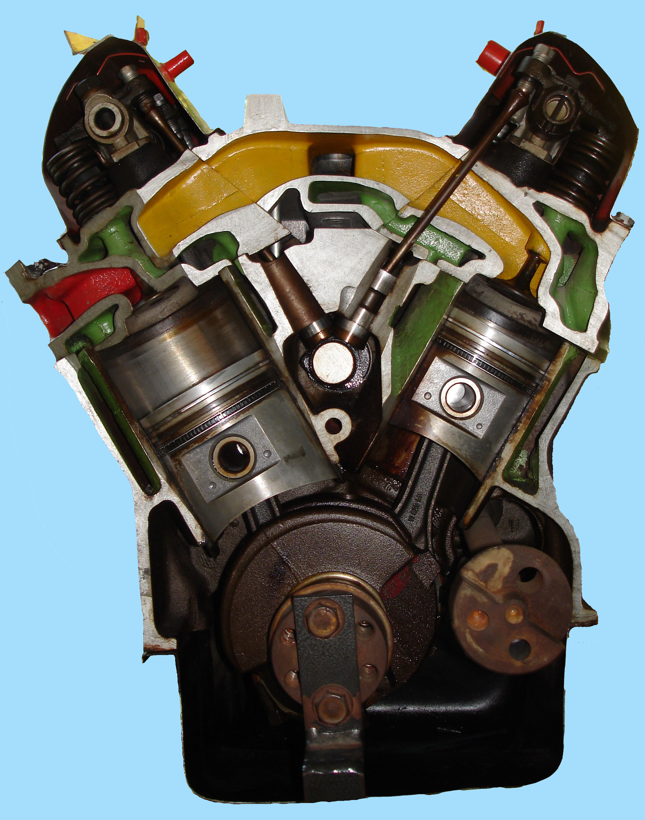 Coupe transversale d'un moteur 4 cylindres en V. En vert le circuit de refroidissement, en jaune le circuit d'admission et en rouge le circuit d'échappement. Arbre d'équilibrage à droite du vilebrequin. Distribution culbutée avec arbre à came central. Auteur: Xavier Lory. L'objet se trouve à l'université technique d'Offenburg (Allemagne).